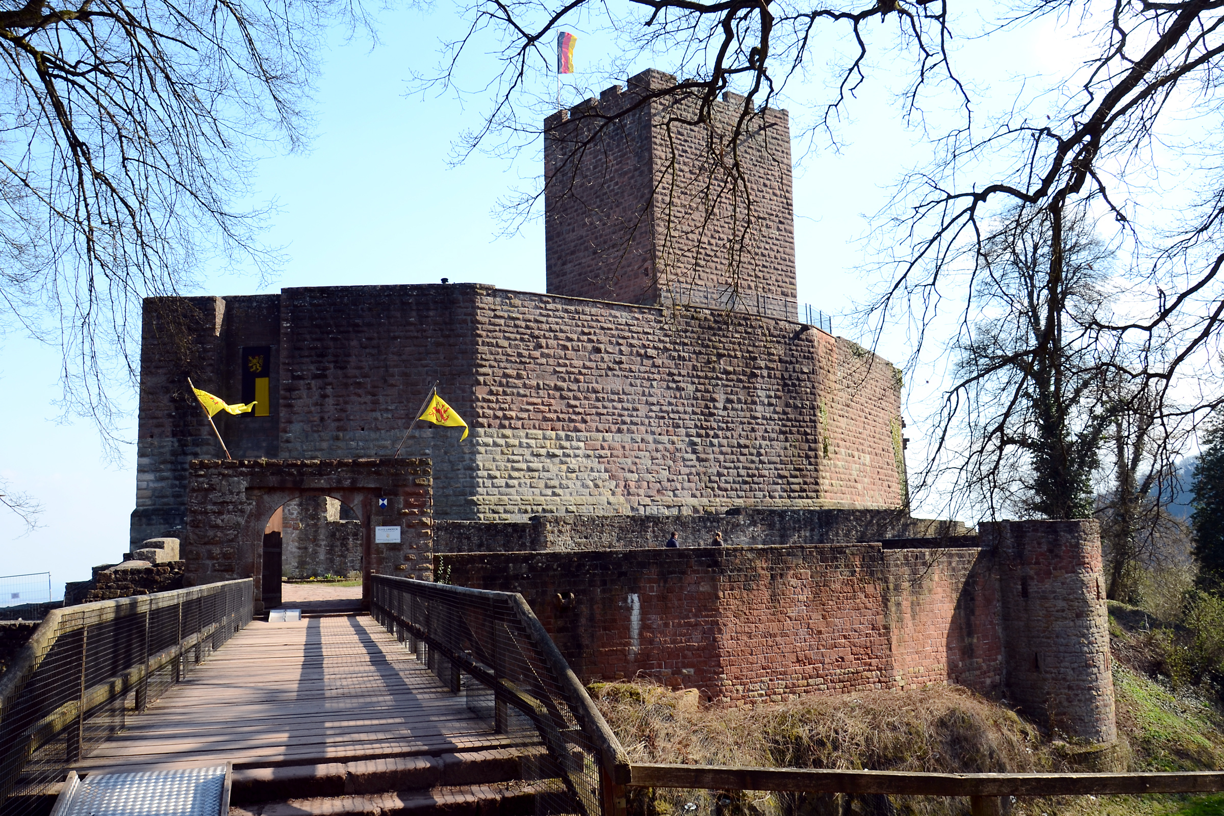 Burg Landeck (Pfalz)